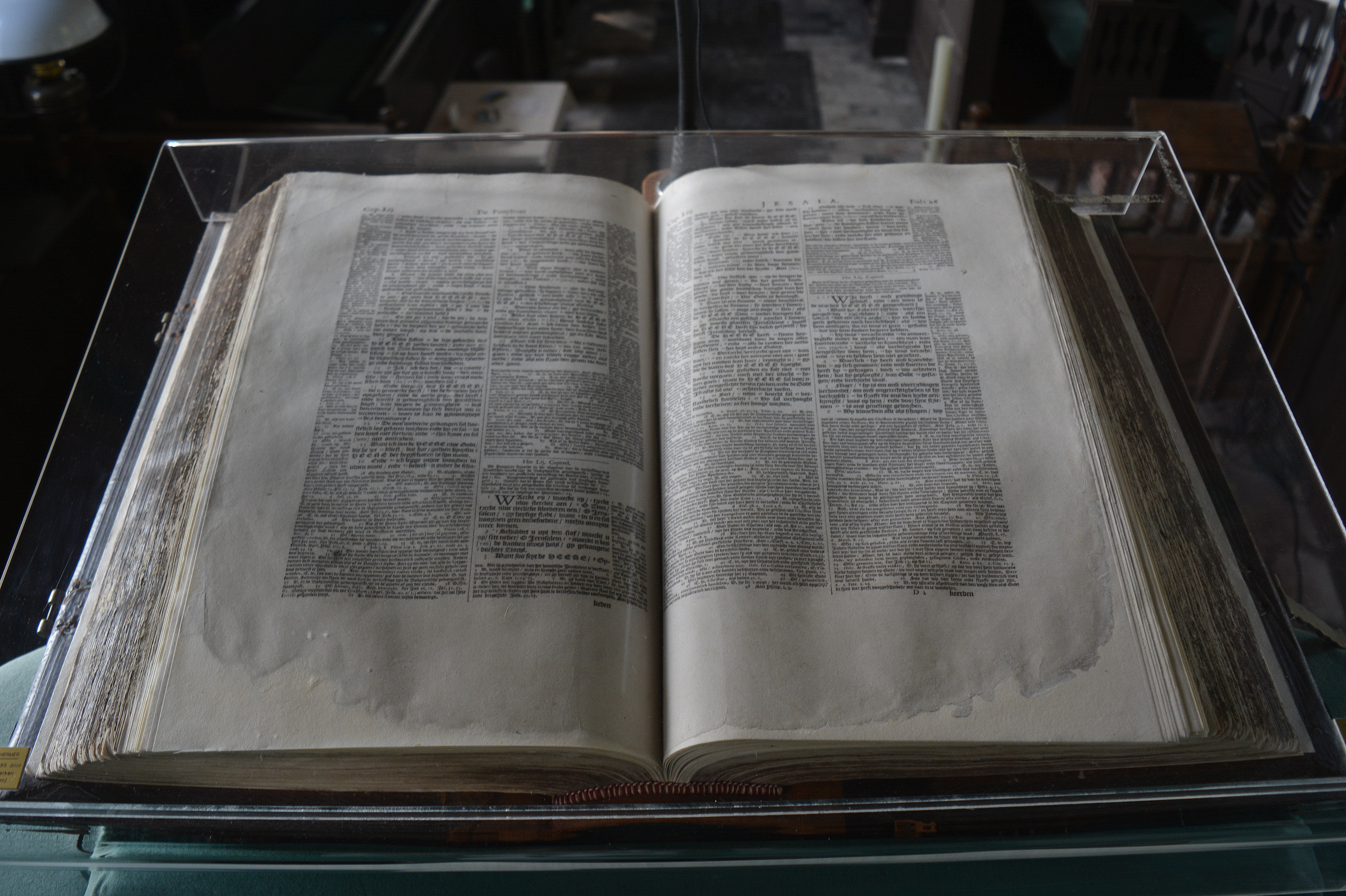 Gertrudiskerk, Lytsewierrum, kanselbijbel